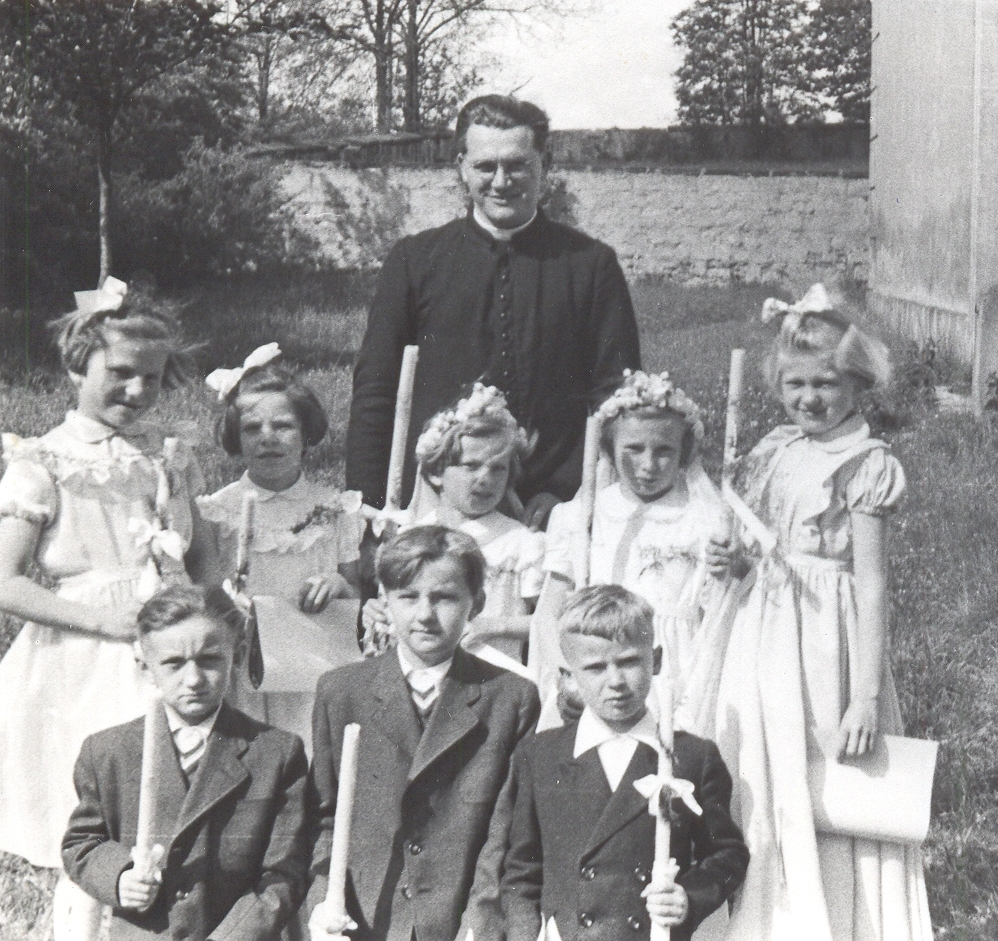 P. Josef Dobiáš, 1. sv. přijímání Cvikov, r. 1960, druhá zleva Šimčíková